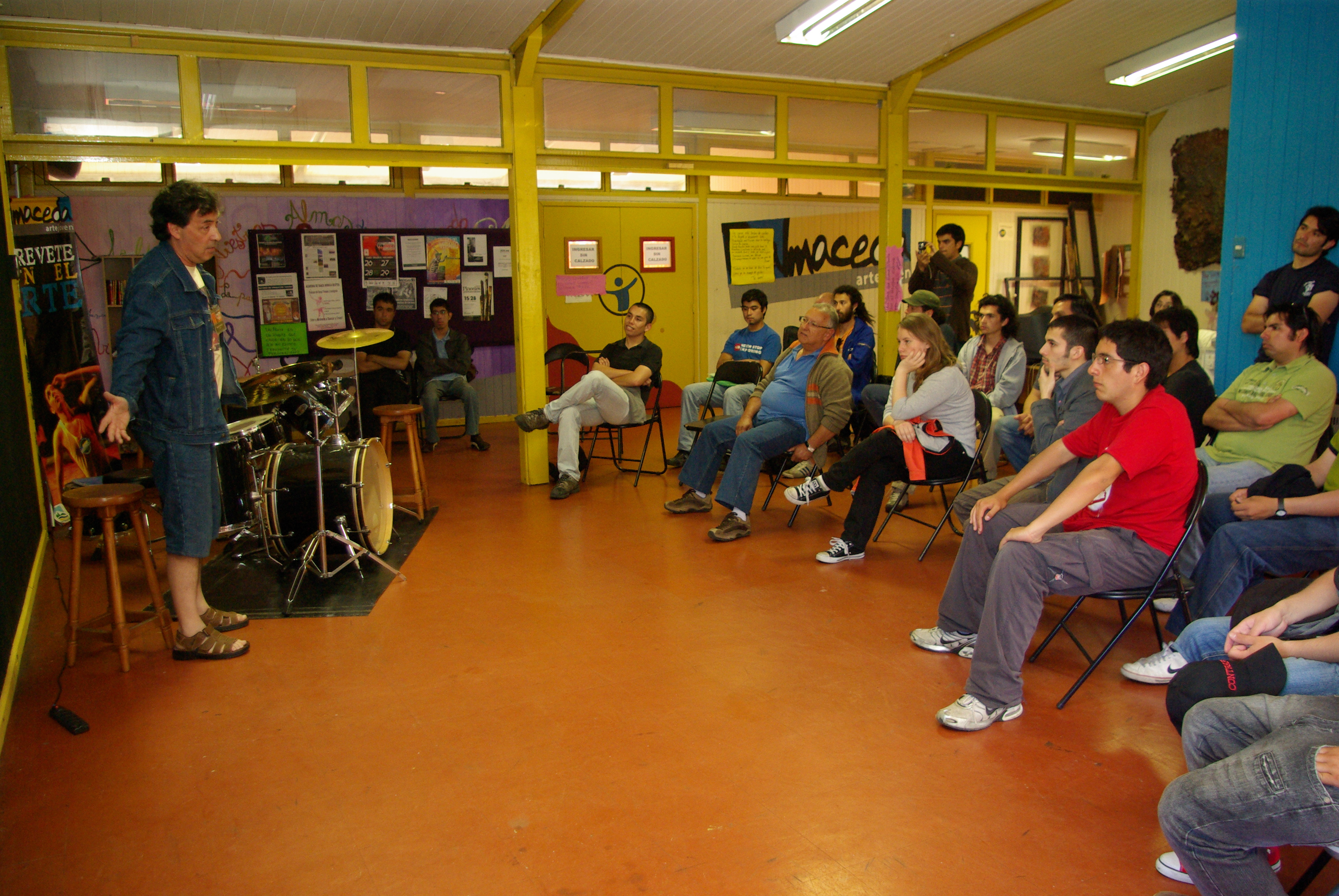 Alejandro Espinosa impartiendo clínica en el 6° Festival Internacional de Jazz de Puerto Montt